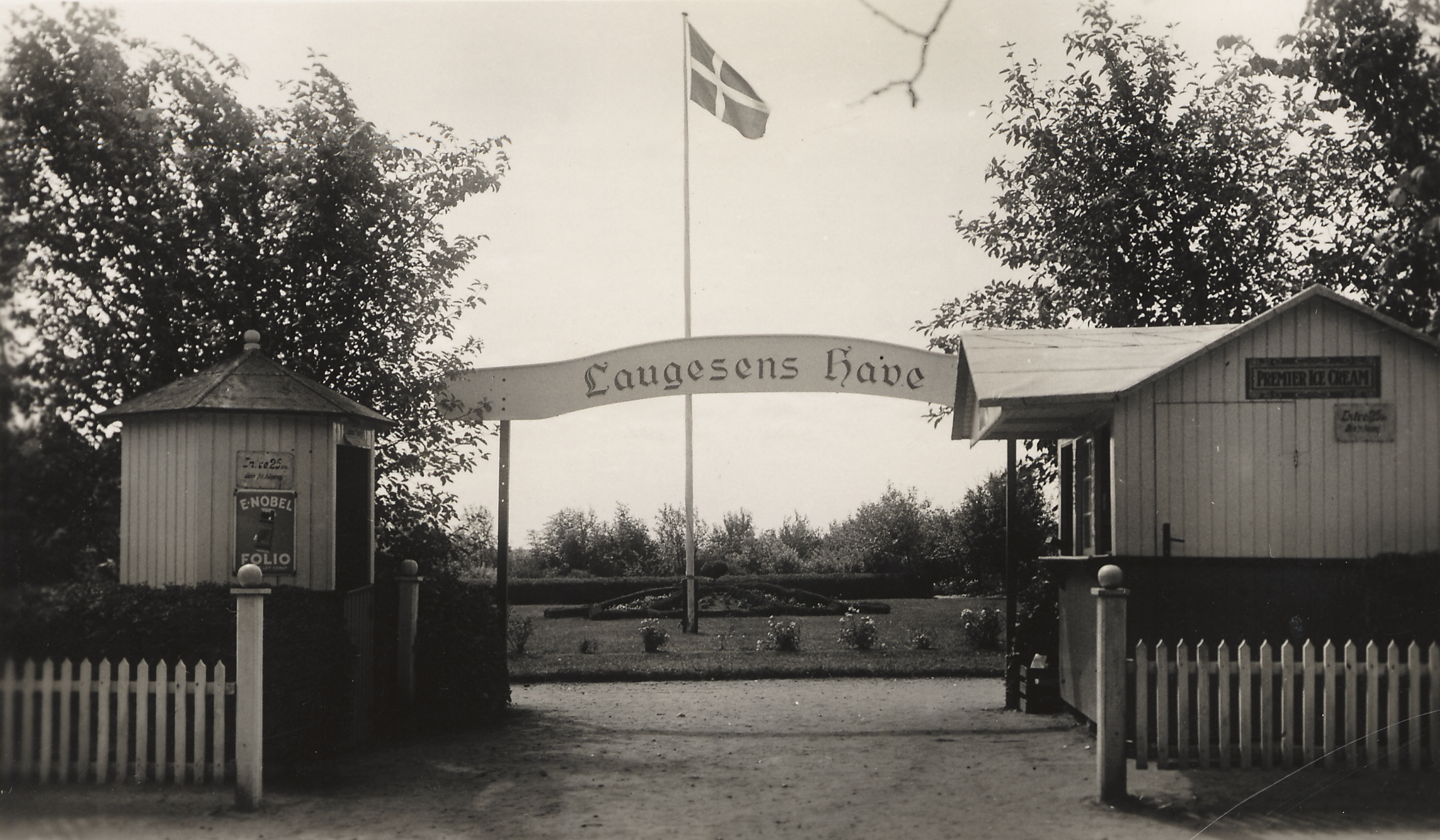 Indgangen til Laugesens Have (årstal ukendt)